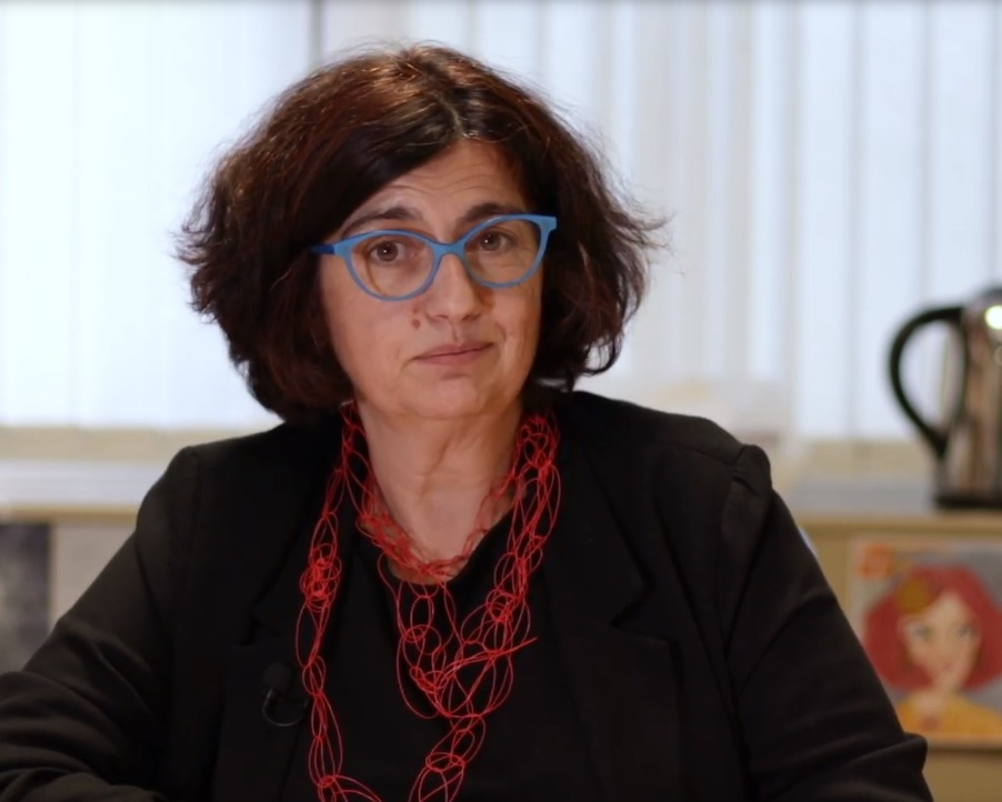 Entrevista a Rosa Lluch. Entrevista a la candidata al Senado de En Comú Podem, Rosa Lluch. Por Sato Díaz. Vídeo de María Artigas.